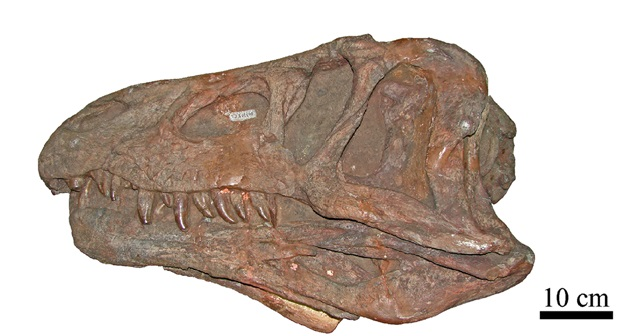 Erythrosuchus skull